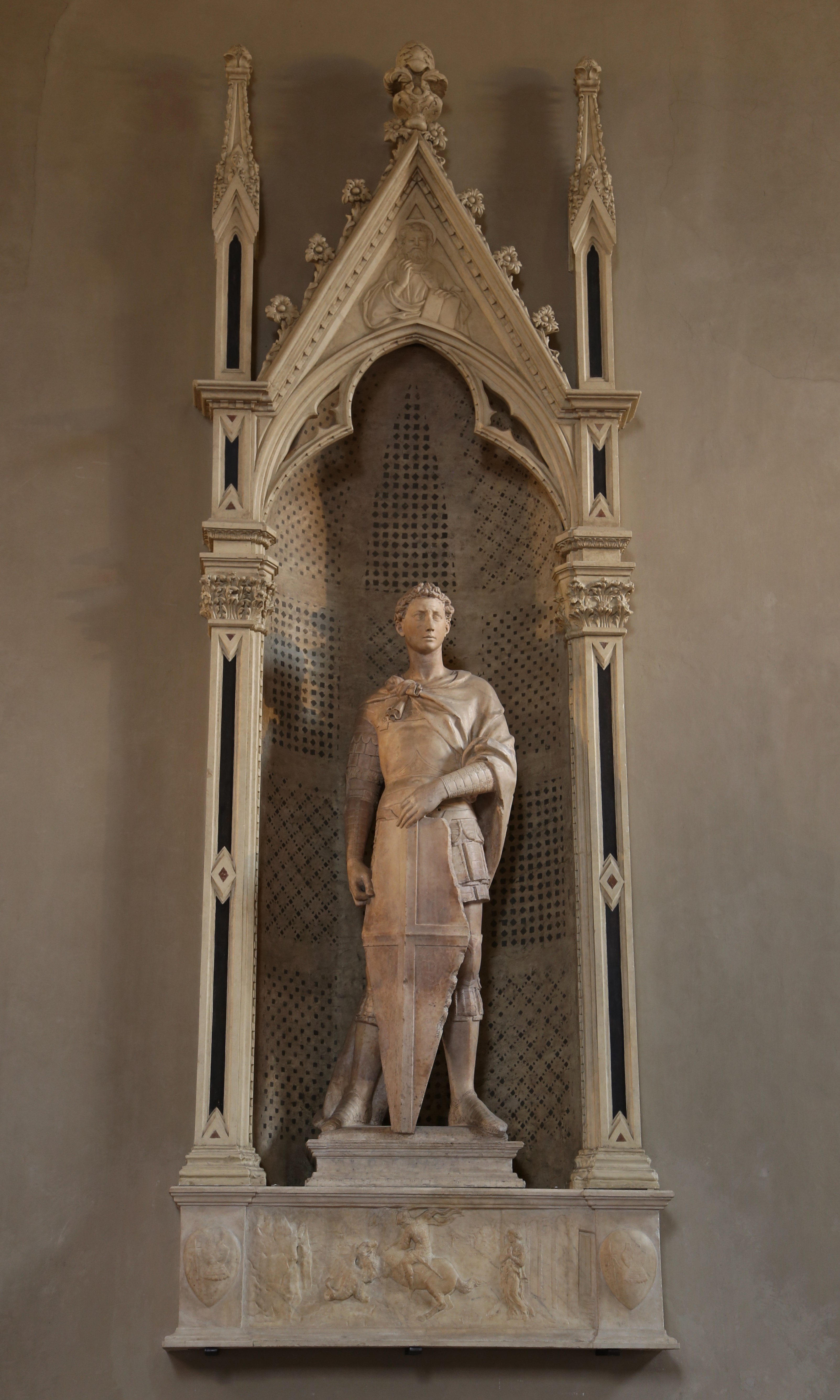 St. Georg, Donatello, ca. 1416-17, Museo del Bargello, Florenz